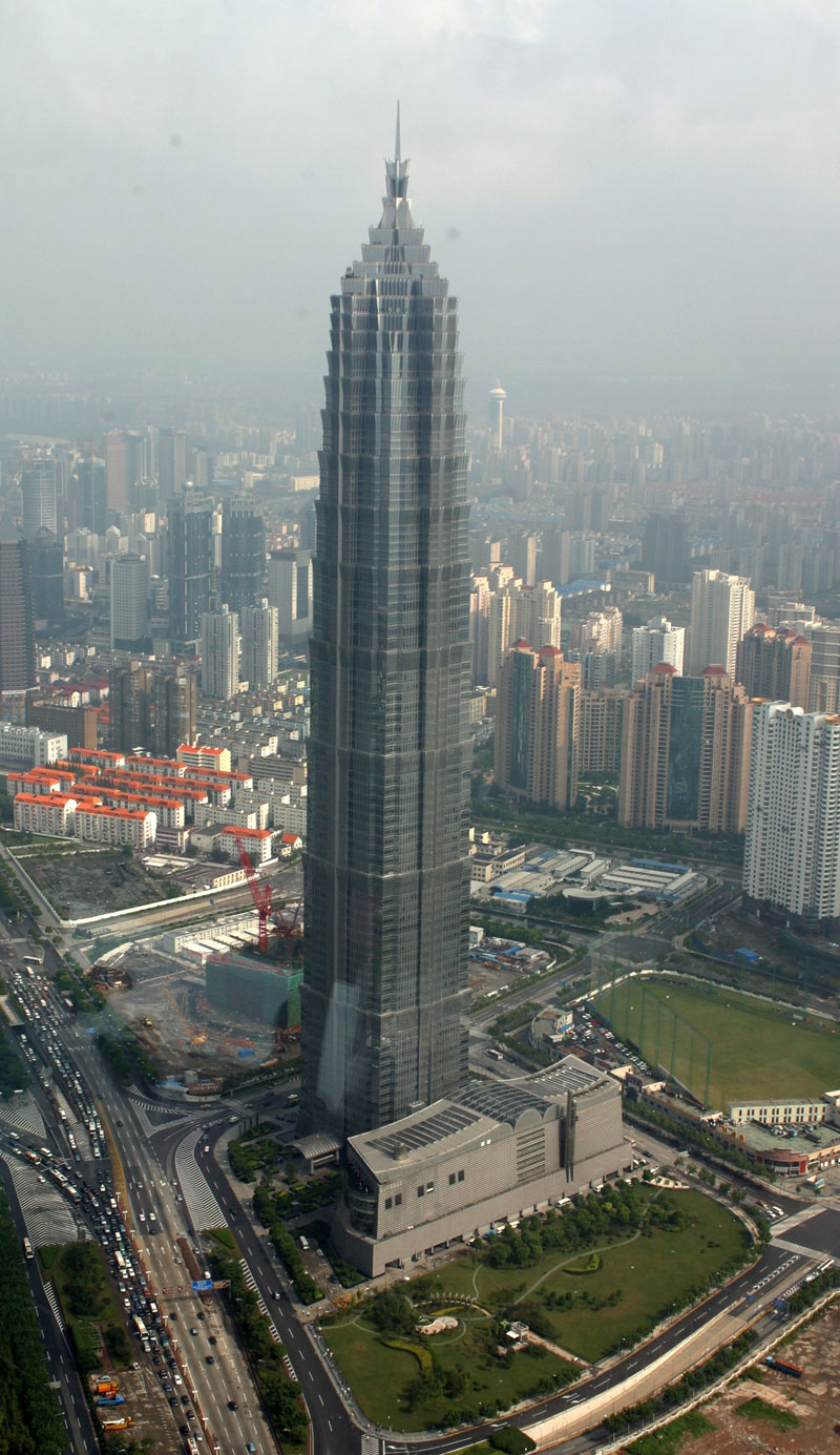 Jin Mao Tower - vue depuis la tour de Shanghai